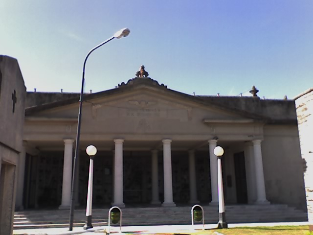 Municipal Cementery, Merlo Partido, Buenos Aires Province.